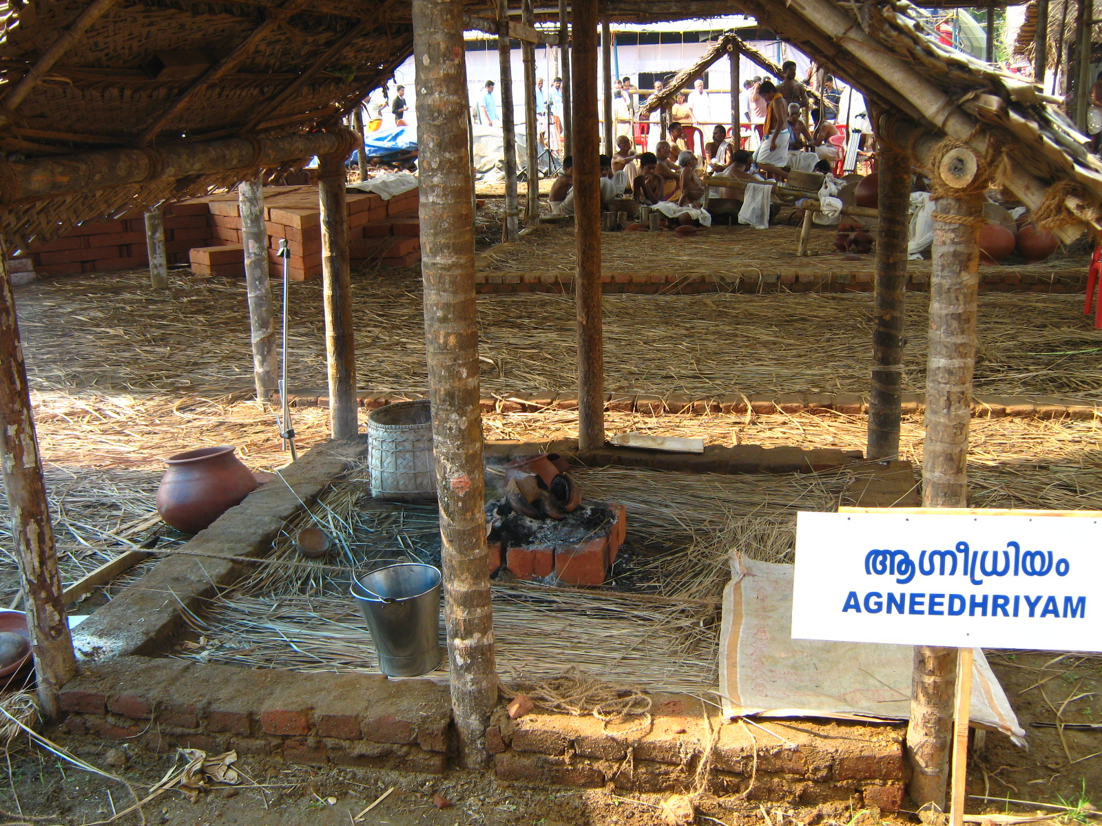 അഗ്നിധ്രീയം പുര, പാഞ്ഞാൾ അതിരാത്രം 2010